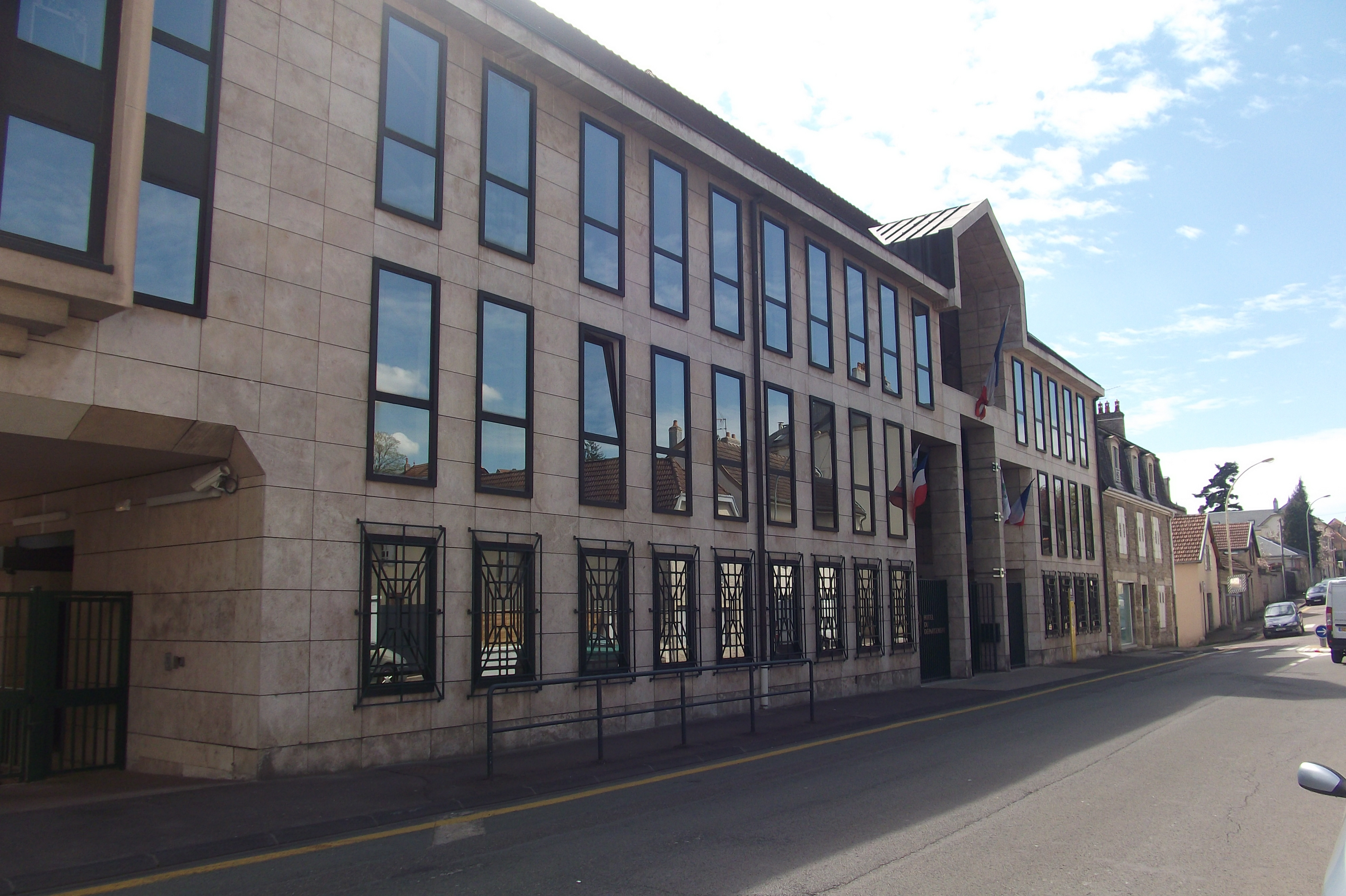 Le Conseil Général de la Haute-Saône à Vesoul (Haute-Saône, Franche-Comté)